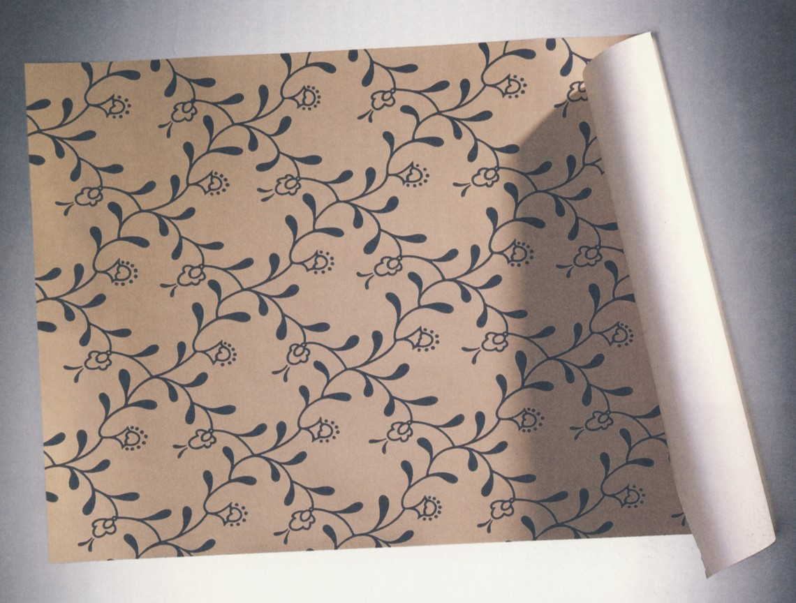 Uno Åhréns tapetmönster "Elsagården" för Hemutställningen 1917